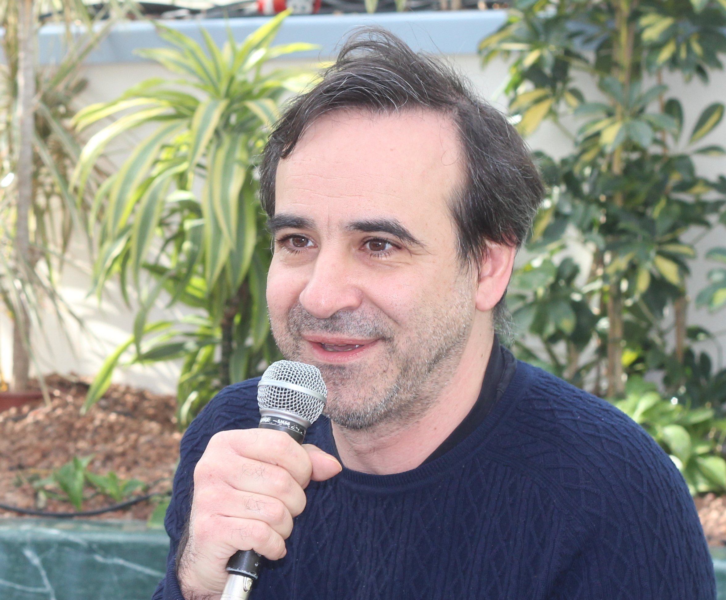 Louis Philippe, Michka Assayas - Festival Livres et Musique à Deauville